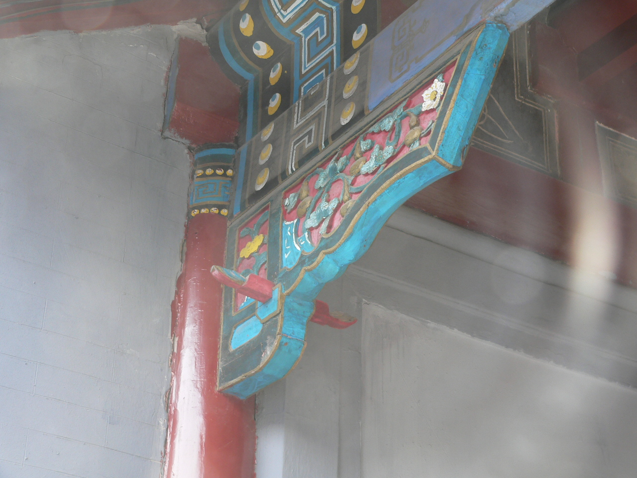 雀替 拍摄 雀替是檐枋与檐柱之间安装的一个木构件，通常雕刻有花纹，有官品的还可以在雀替上安装三幅云